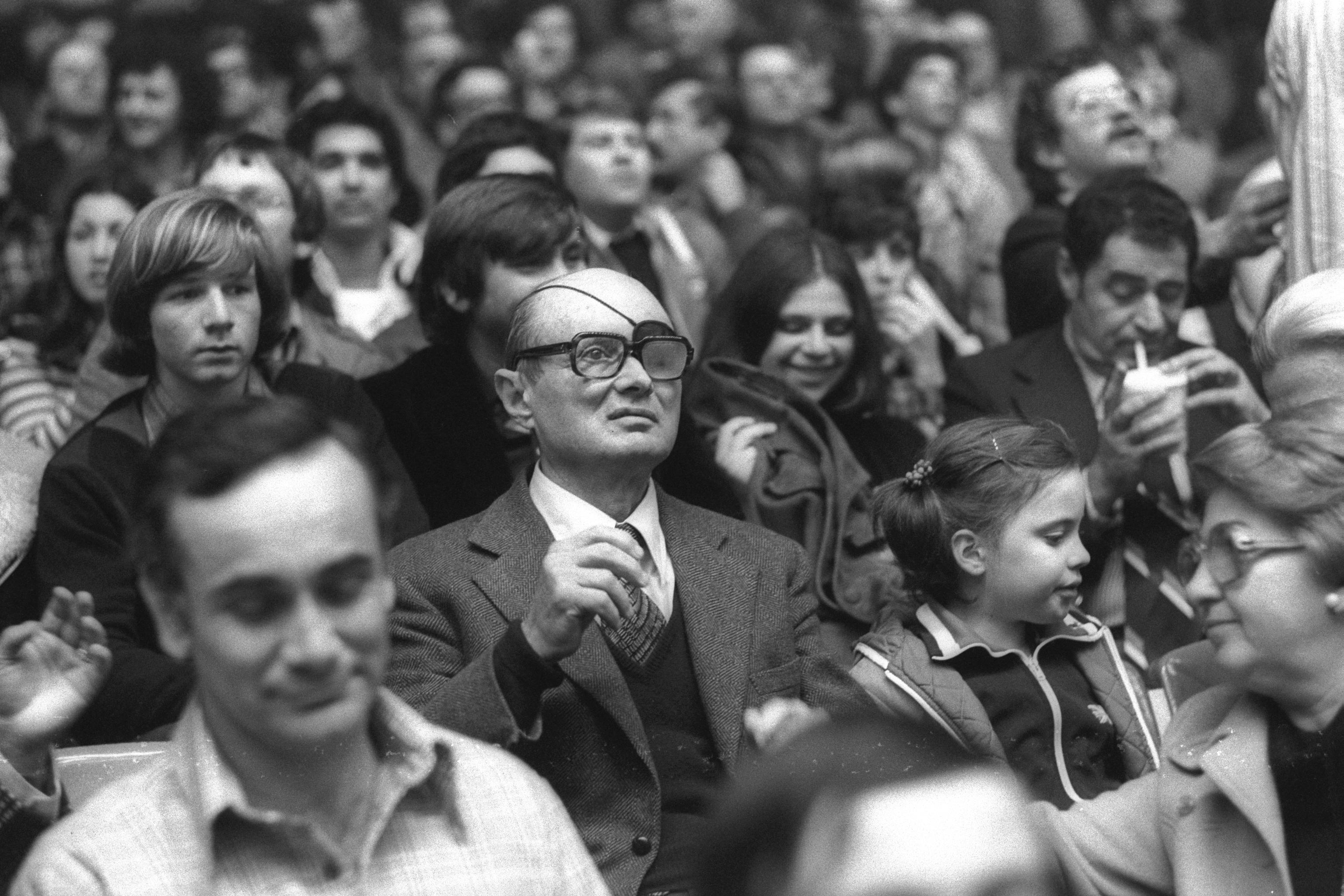 Rare photograph of Moshe Dayan with spectacles sitting at his place of honor during a Maccabi Tel Aviv basketball game in the European Cup games in Tel Aviv. השר לשעבר משה דיין מתבונן במשחק כדורסל של קבוצת מכבי תל אביב, המשתתפת במשחקי גביע אירופה לאלופות, בהיכל הספורט ביד אליהו. Photo: ROTH YOSSI, 03/30/1979